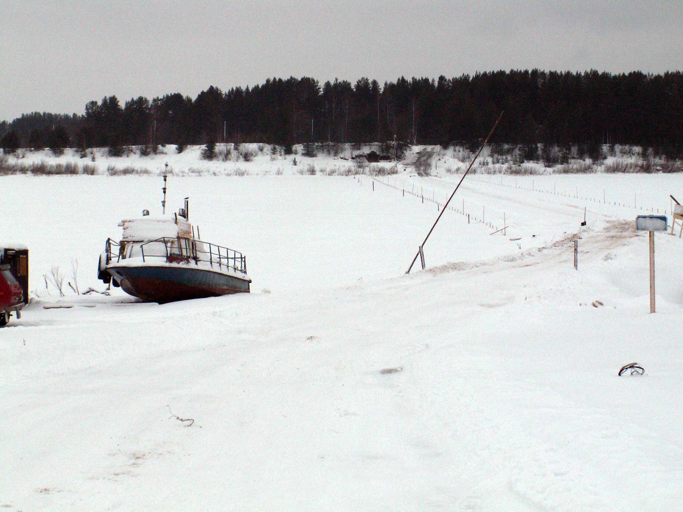 Переправа по льду в Пасьву